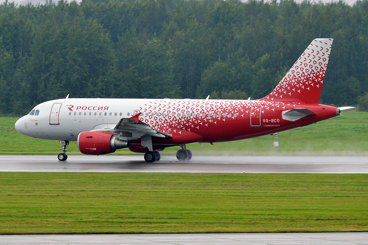 Rossiya, VQ-BCO, Airbus A319-111